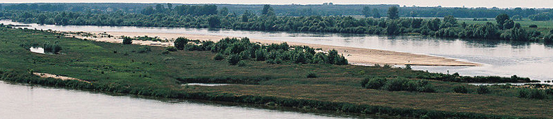 Męćmierz Krowia Wyspa na Wiśle - rezerwat ornitologiczny